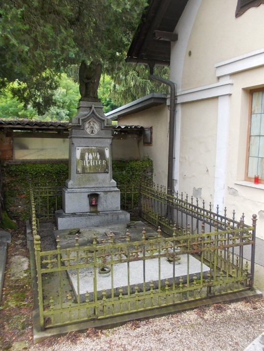 Grab Paul Richter-Friedhof Weidling